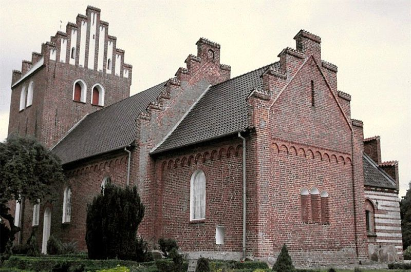 Tikøb Kirke i Danmark. Tikøb kirke